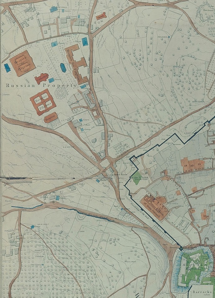 דרך יפו - פרט מתוך מפת וילסון (1864-1865, מהדורה מעודכנת 1876) של ירושלים העתיקה